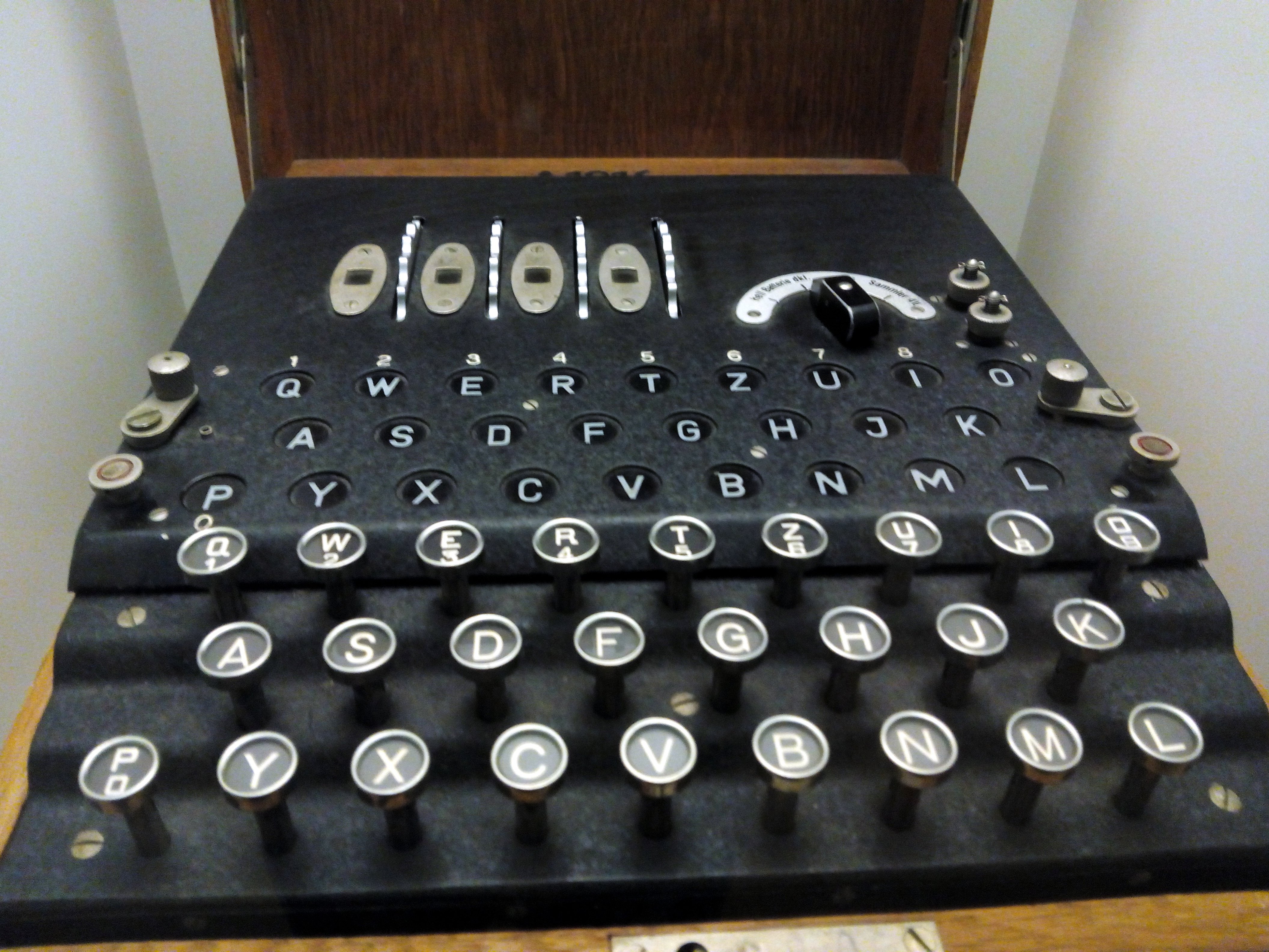 Museo del Ejército, Toledo (España).